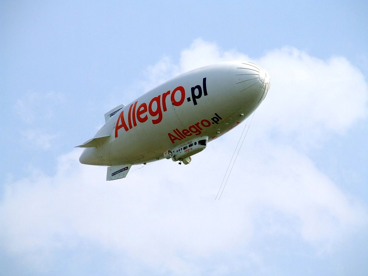 Sterowiec Allegro nad Warszawą